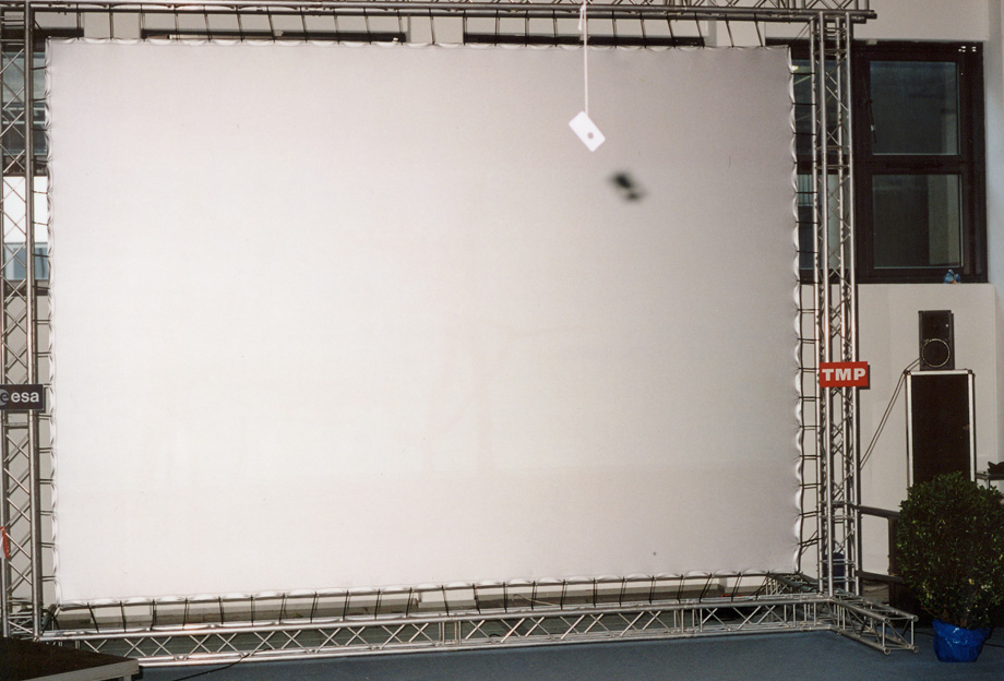 Das Bild stammt aus dem 3D Event Archiv der TMP-Mediagroup